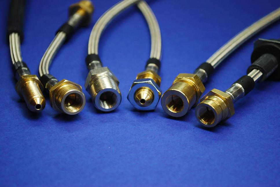 Unterschiedliche Anschlüsse von Evolity Stahlflex Bremsleitungen